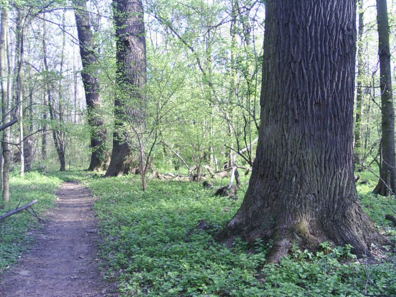 Rezerwat Przyrody Lasek Bielański (Warszawa; Polska)